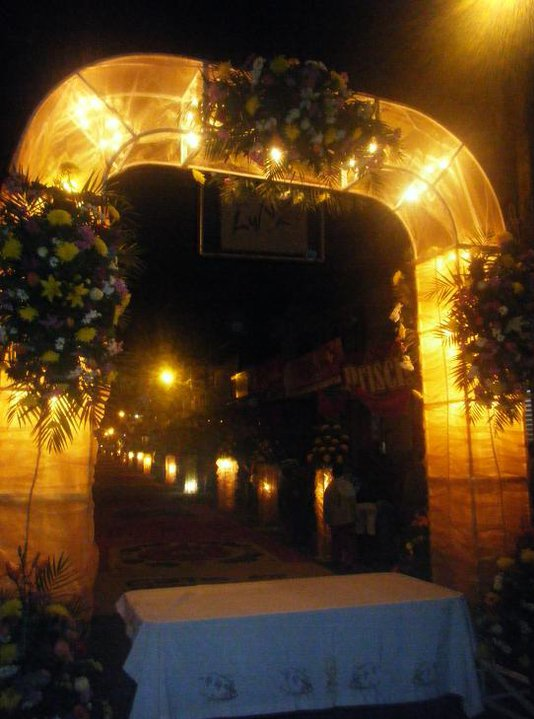 Uriangato: Muestras artísticas de los tapetes realizados en Uriangato, Gto.